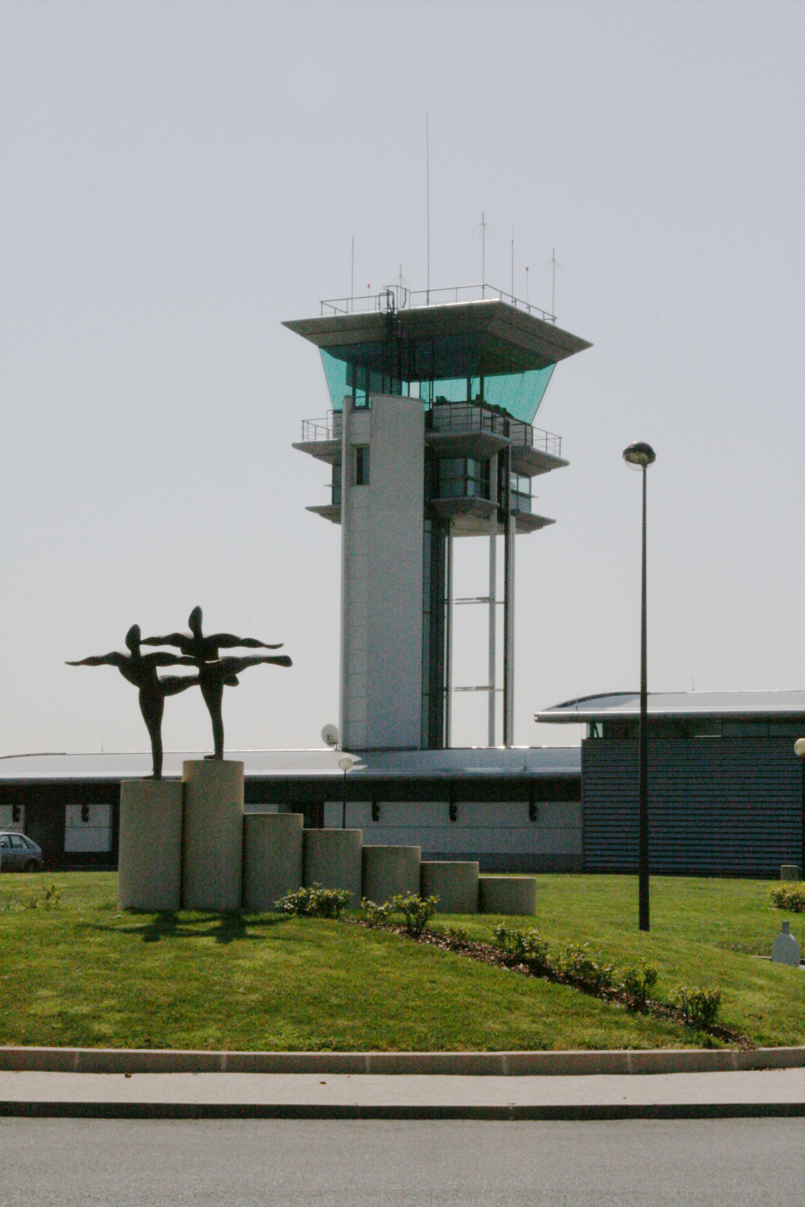 Tour de l'aéroport d'Angers-Marcé.